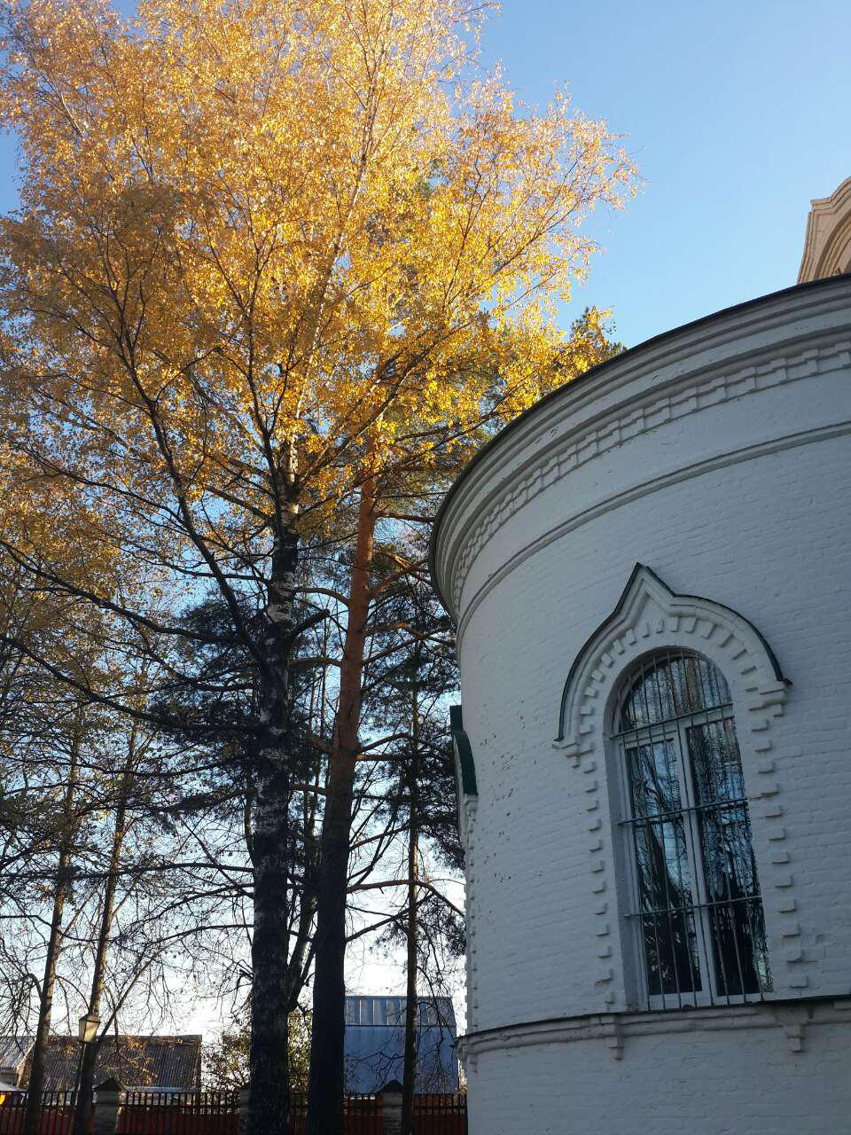 Алтарь с северо-востока